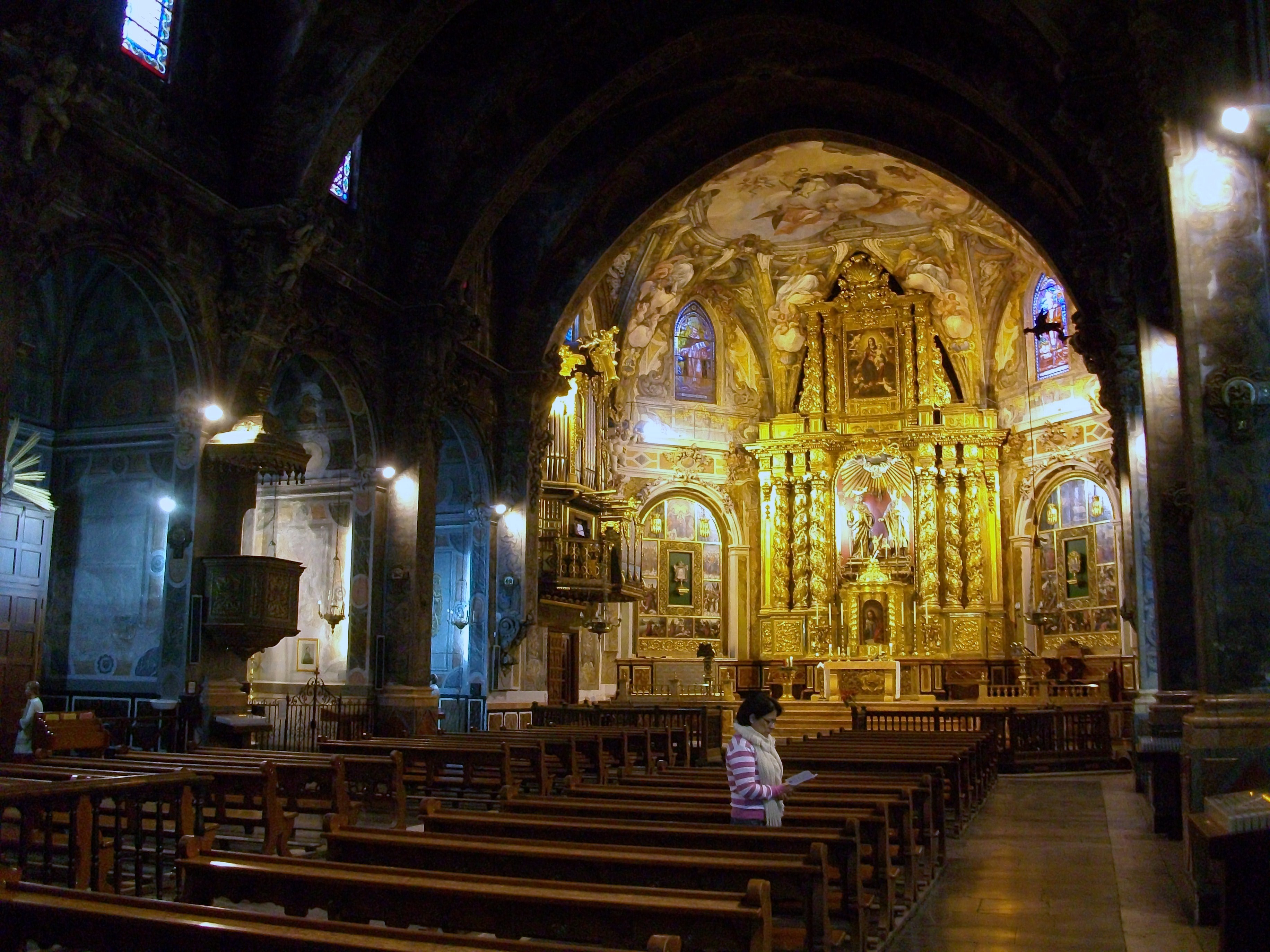 Interior de l'església de sant Nicolau, València.